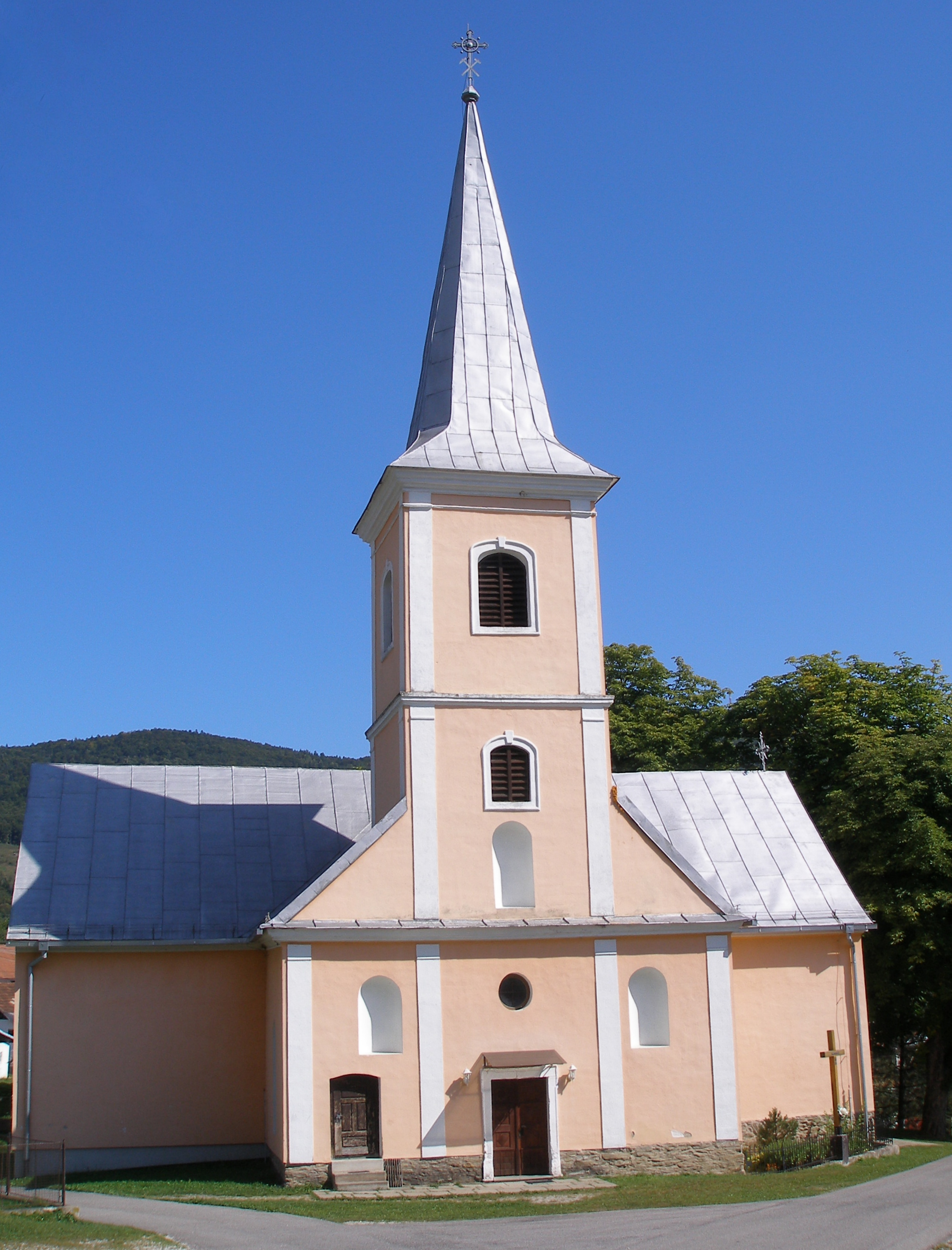 Kostol, Spišská obec Helcmanovce, Okres Gelnica